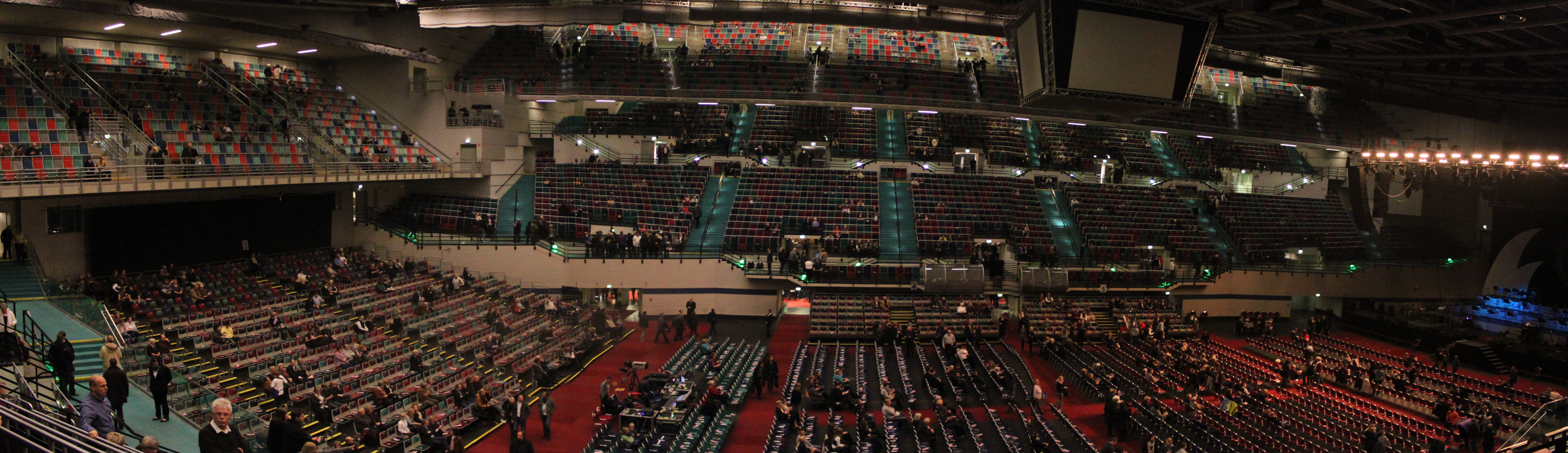 Großer Saal im AWD Dome Bremen - vor dem Konzert von David Garrett